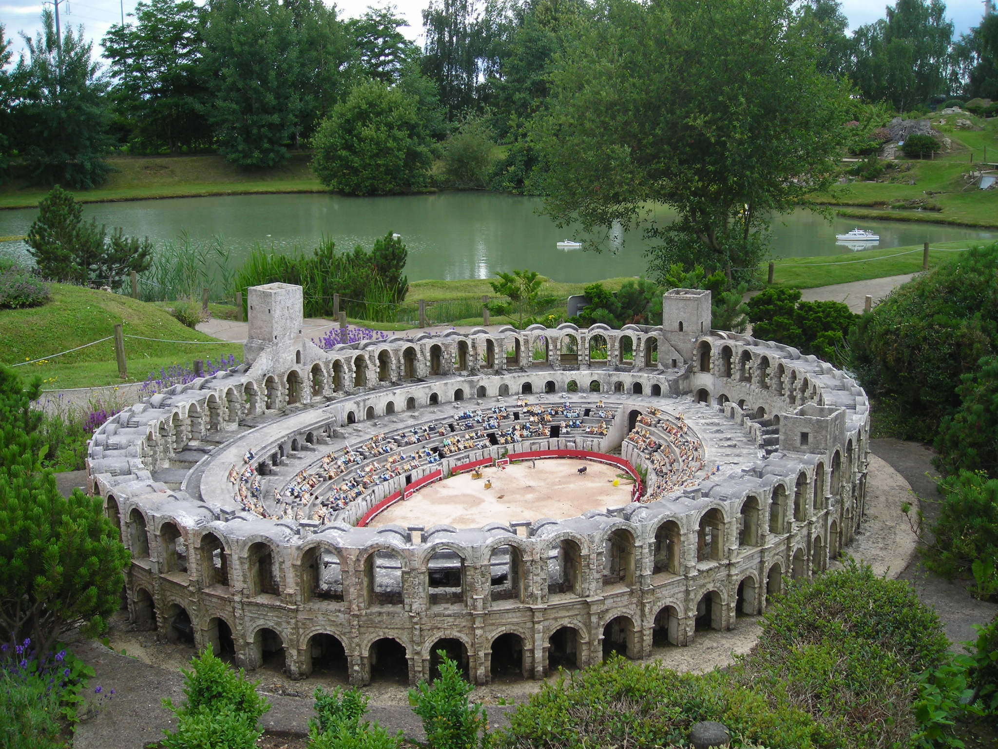 Maquette de l'arène d'Arles à France Miniature (Élancourt)